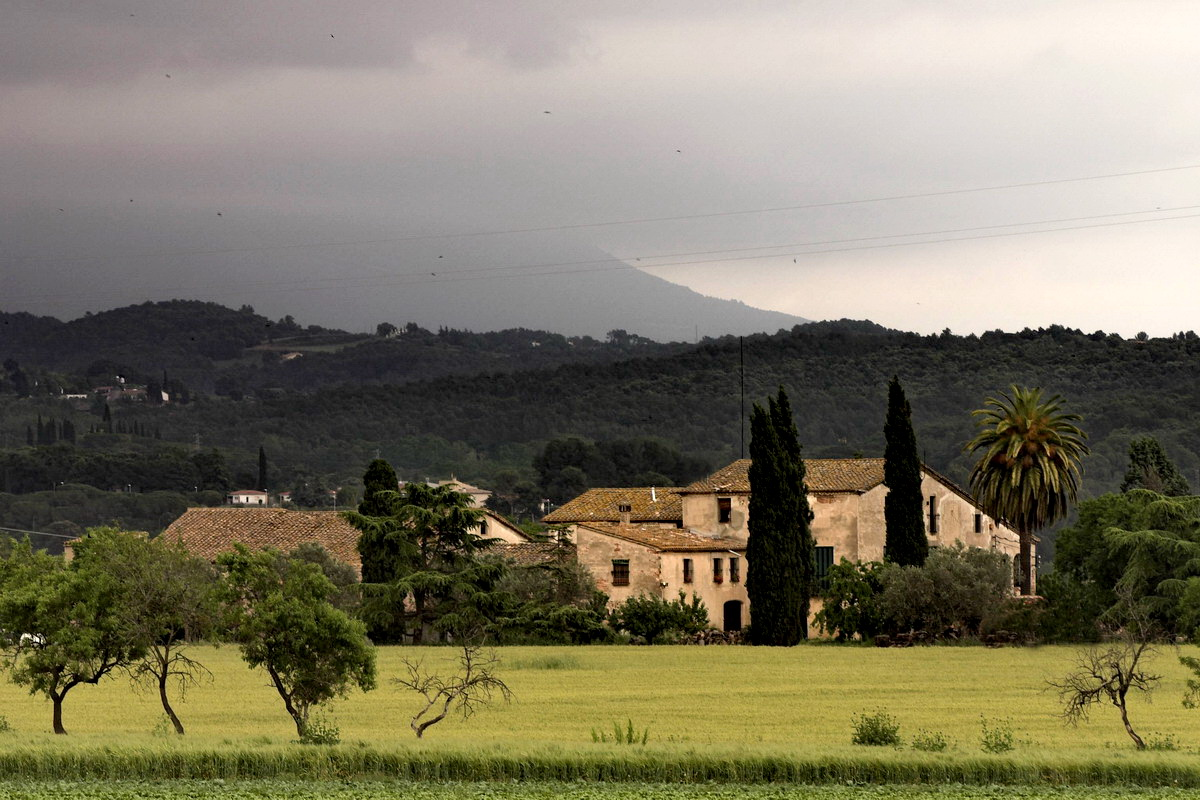 Masia de Can Margens (les Franqueses, Vallès Oriental, Catalonia, Spain). Segle XVI